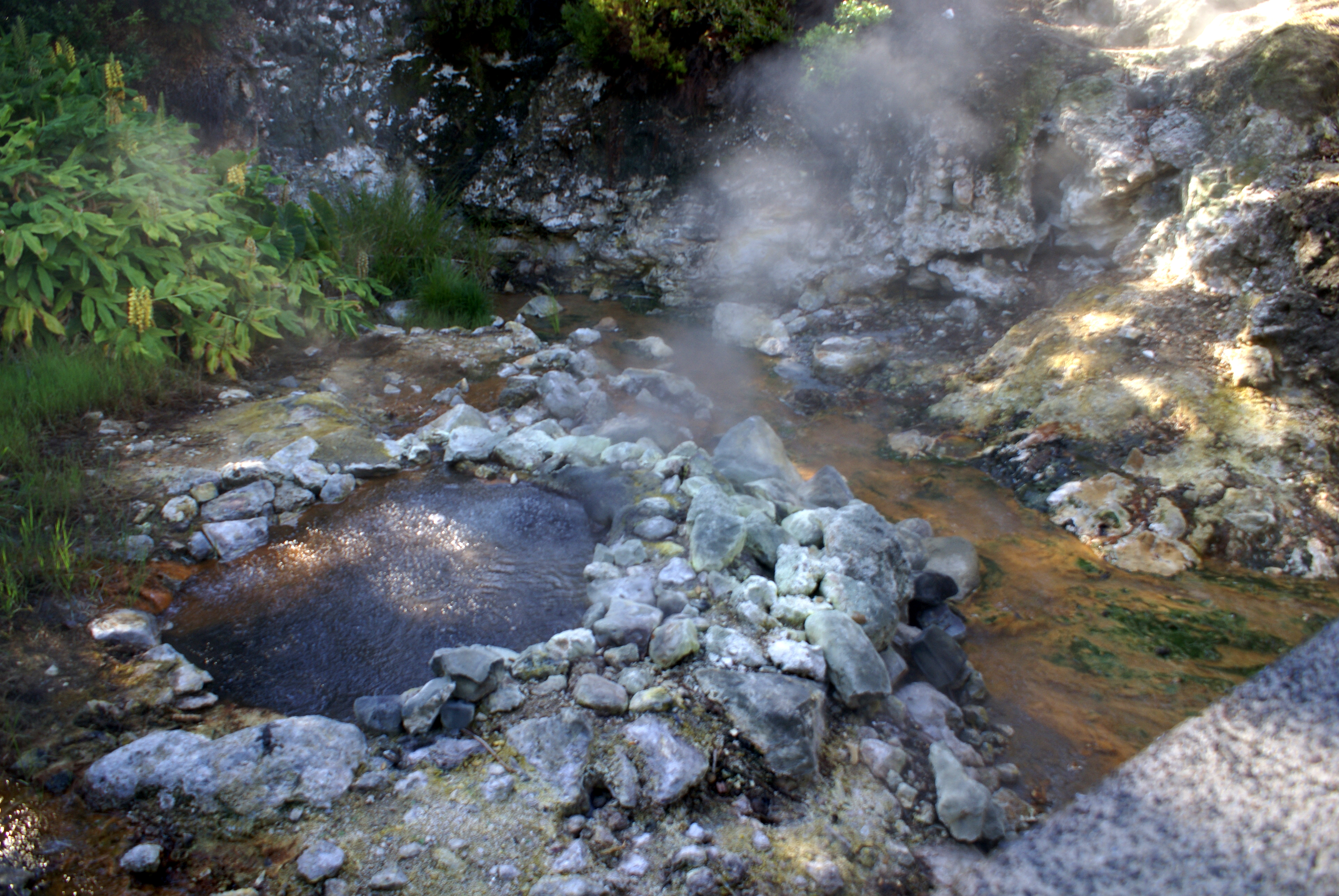 Caldeira e riacho, Vale das Furnas, Povoação, ilha de São Miguel, Açores